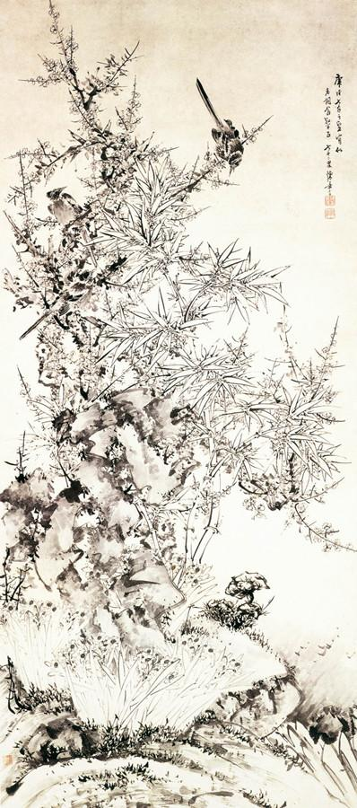 陈嘉言的《竹石梅鹊图》，藏于上海博物馆